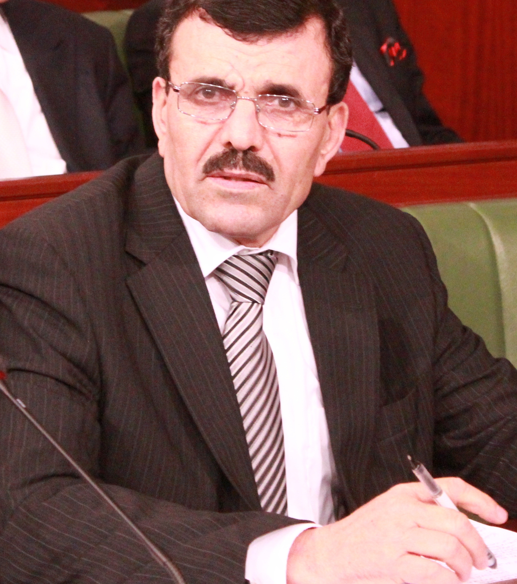 Ali Larayedh, ministre de l'intérieur, à une séance de questionnement à l'ANC en Mars 2012